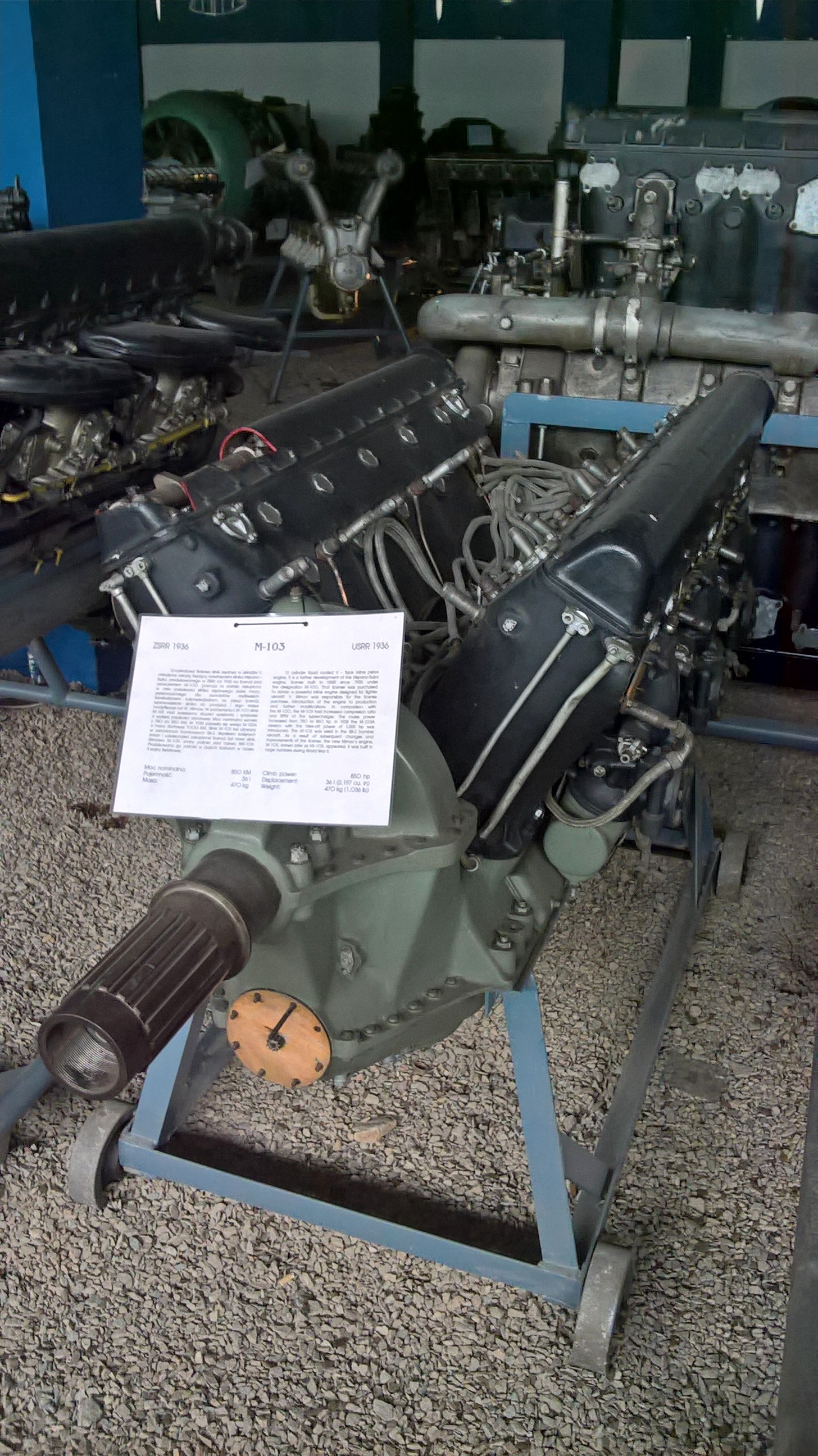 Radziecki 12-cylindrowy silnik widlasty M-103 z 1936 r. ze zbiorów Muzeum Lotnictwa Polskiego w Krakowie.